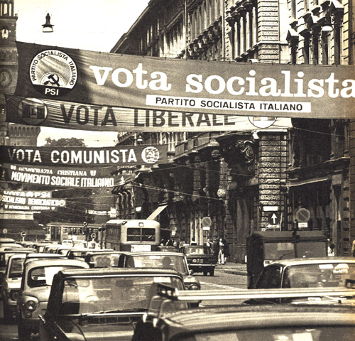 Milano: striscioni per la campagna elettorale delle elezioni politiche del 1972 Domenica del Corriere del 9 maggio 1972